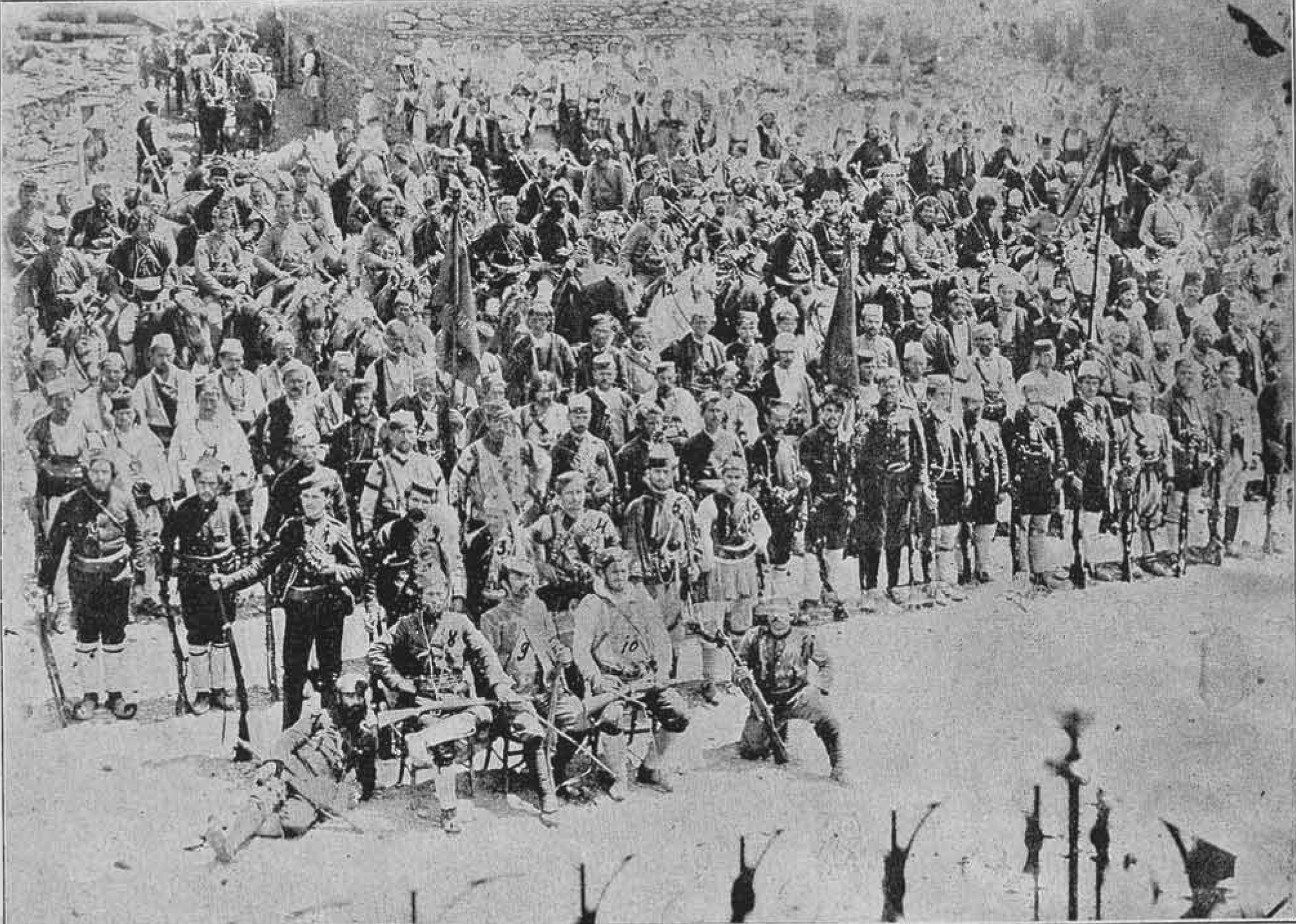 IMARO Cheti in Bitola: Slavcho Pirchev, Nikola Dosev, Angel Bazarski, Dimko Dragovcheto, Petre Kosturcheto, Mariovcheto, Krystyo Lyondev, Kryste Traykov, Milan Matov, Dzole Gergev, Vasil Saatchiyata, Kryste Malinkov